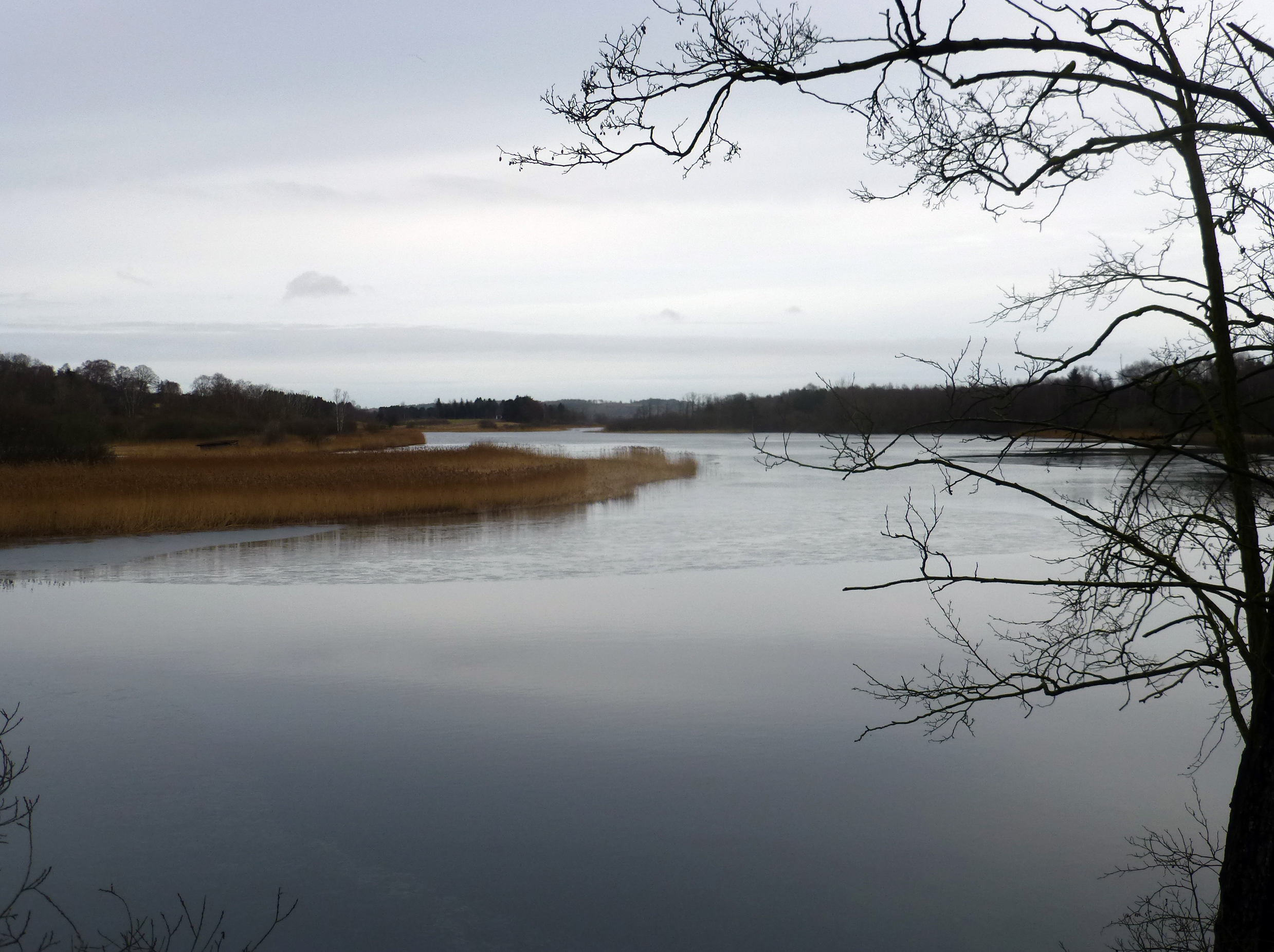 Gudenaa ved Langsøs udløb øst for Silkeborg